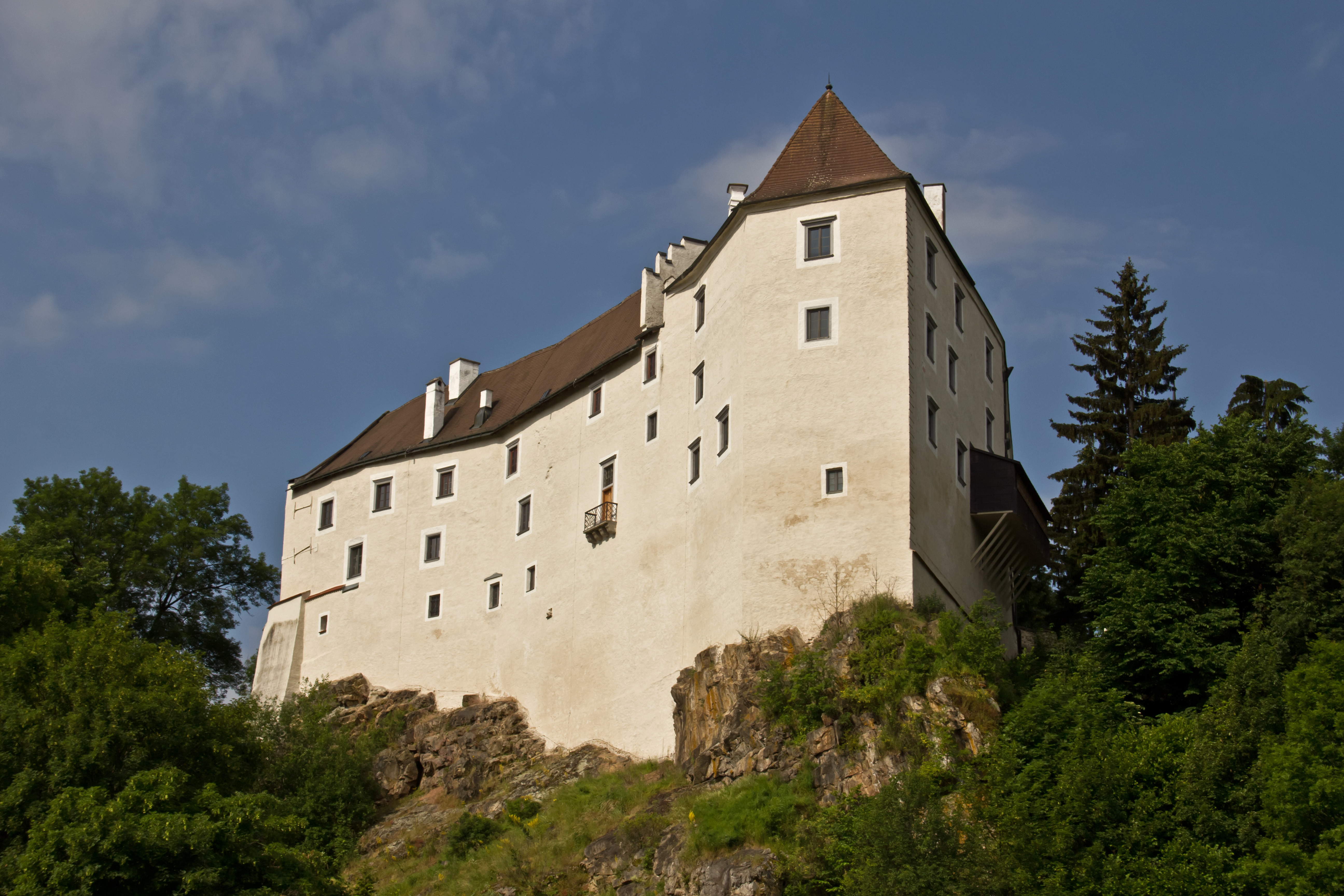 Burg Karlstein ist eine Spornburg, die auf einem steil abfallenden Bergrücken im Süden hoch über dem Ort liegt.